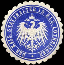 Sealing stamp Title: Der Kaiserliche Statthalter in Elsass Lothringen Description: blau, weiß, geprägt Place: size: 4 cm